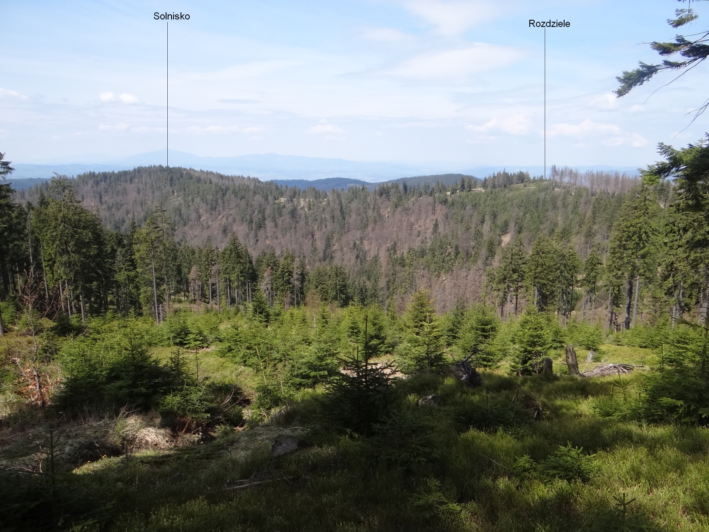 Widok od południa na grzbiet Rozdziele-Solnisko w Gorcach